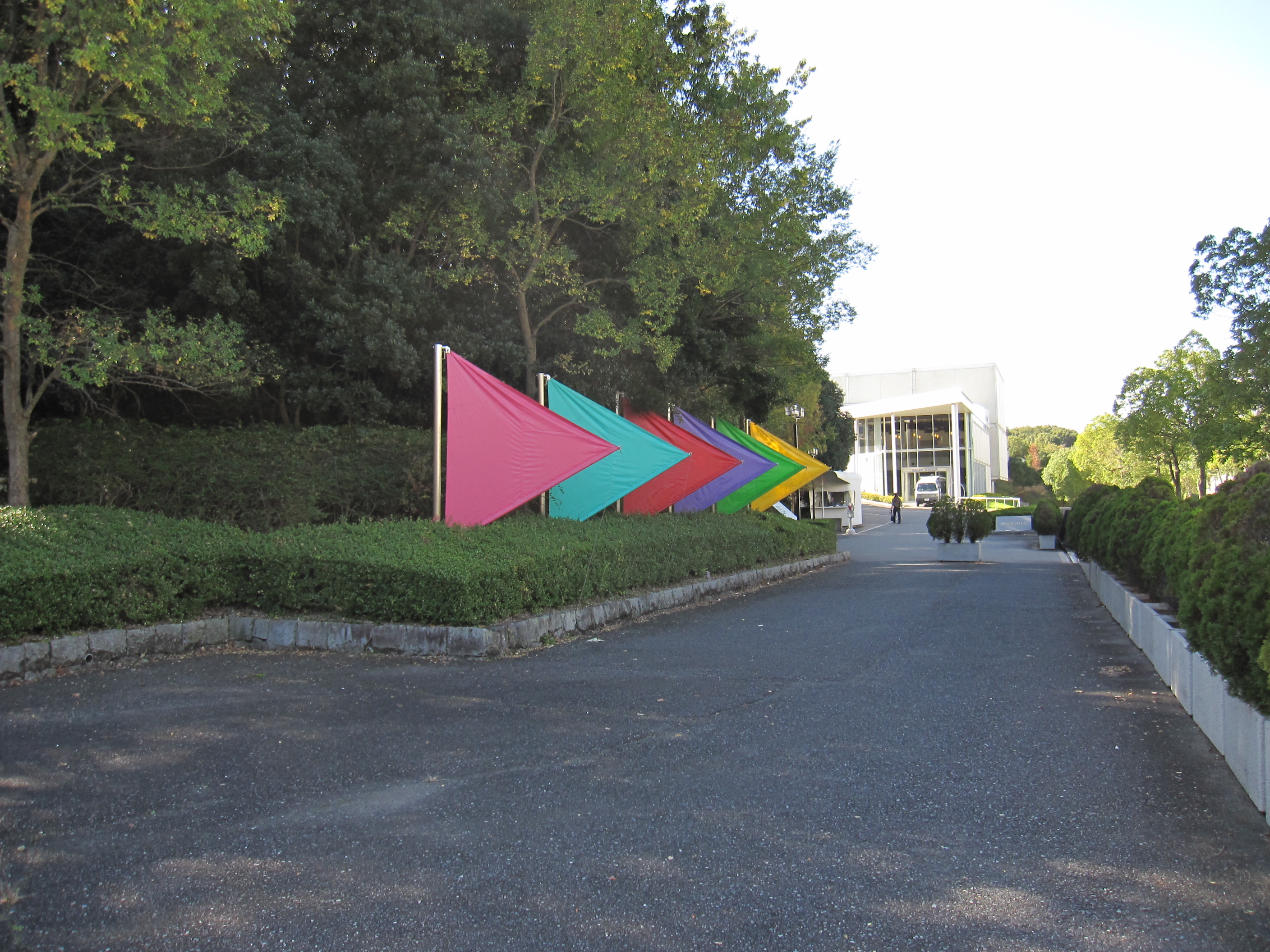 神戸芸術工科大学正門